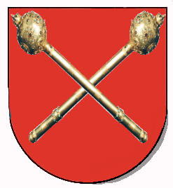 Herb Hetmanów Rzeczypospolitej author User:Mathiasrex -Maciej Szczepańczyk